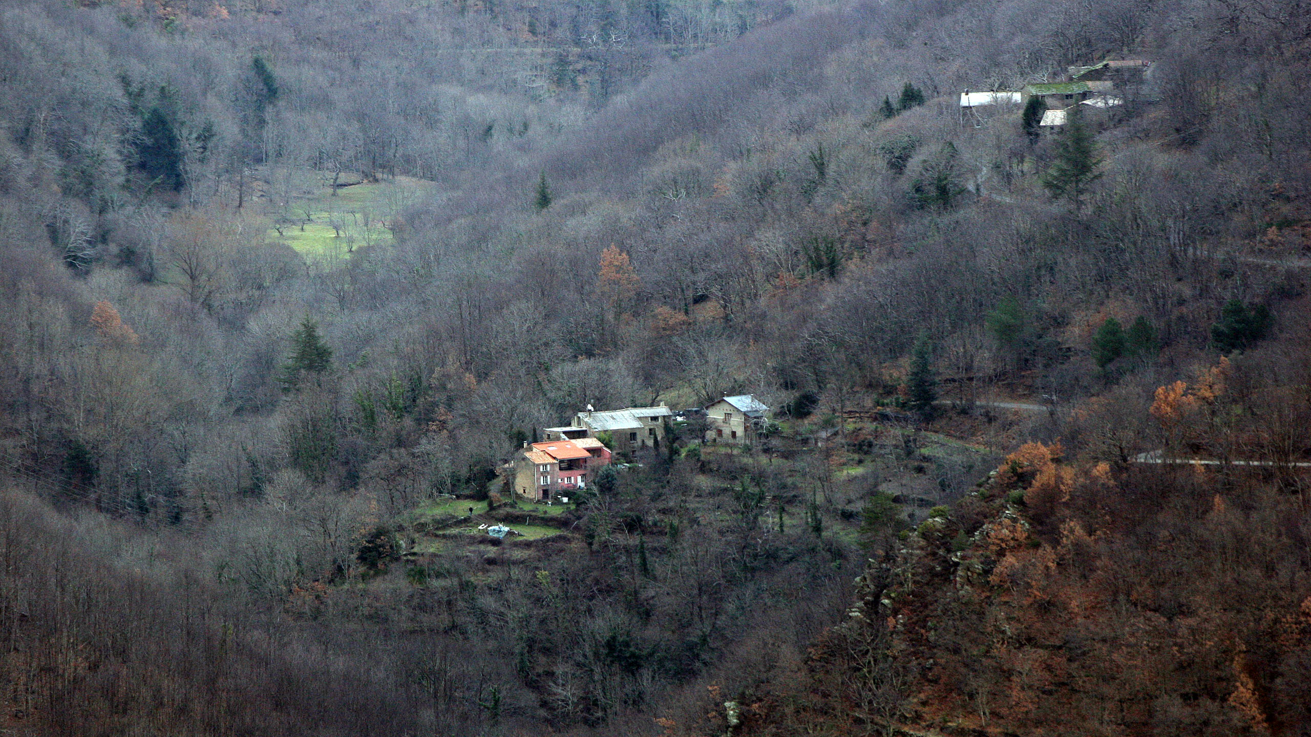 Hameau